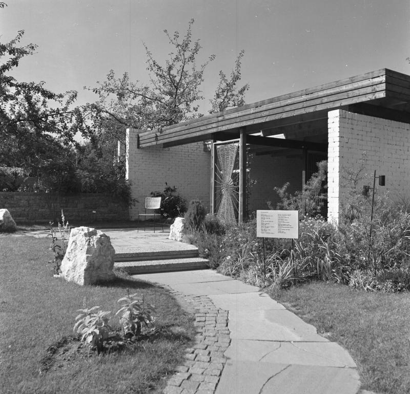 Bundesgartenschau 1961 Stuttgart 11.-16.9.1961